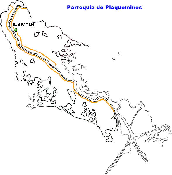 Benjamin Switch, Louisiana.